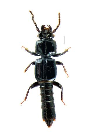 Plastus amplus (scale bar = 1 mm)